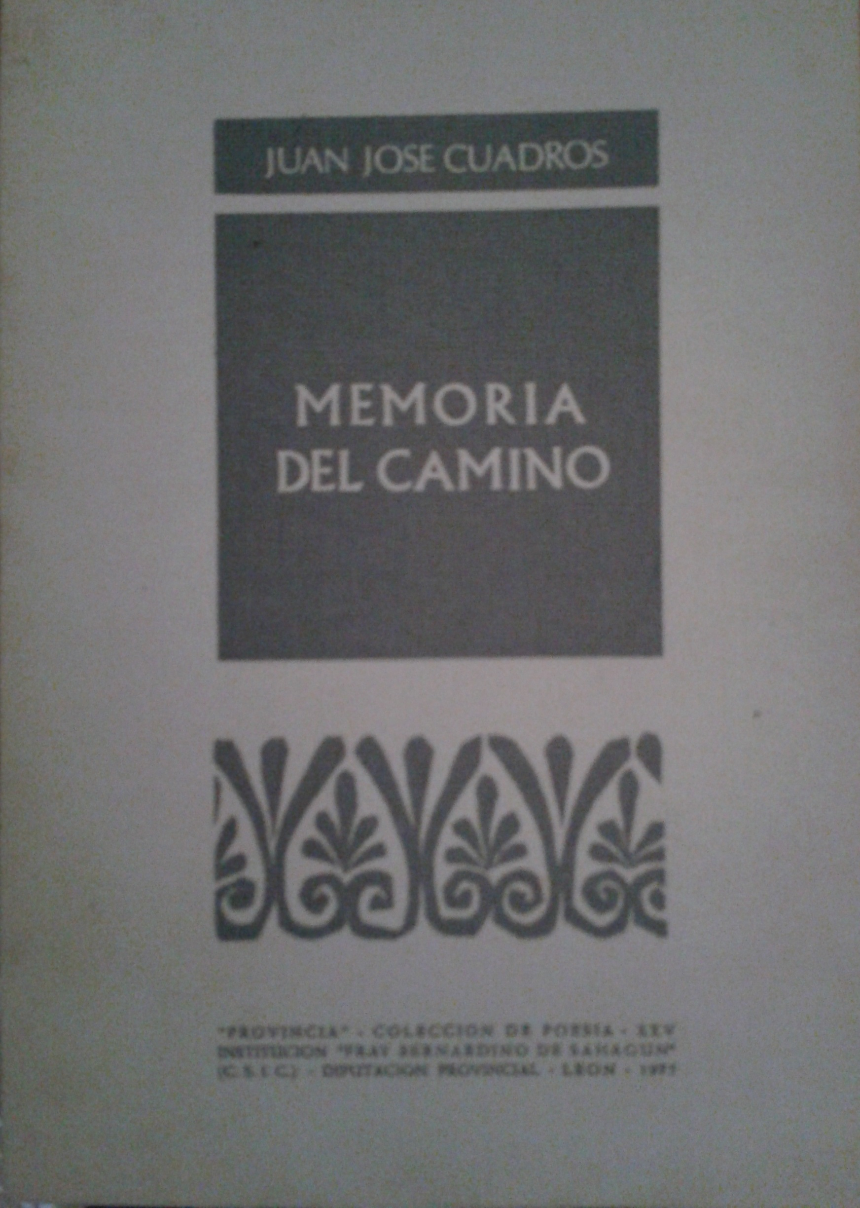 Memoria del camino de Juan José Cuadros, 1975